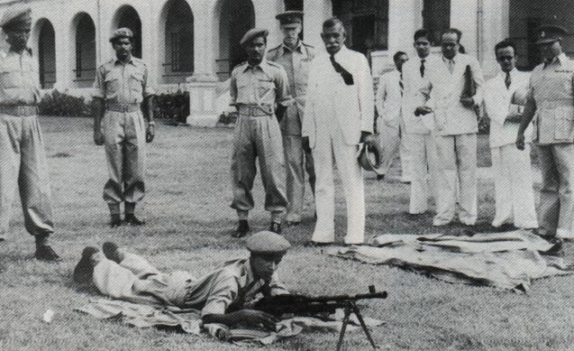 Первый премьер-министр независимой Шри-Ланки Дон Стивен Сенанаяке посещает 1-ый батальон Цейлонской лёгкой пехоты на площади Эчелон и наблюдает как резервисты учатся стрелять из пулемёта